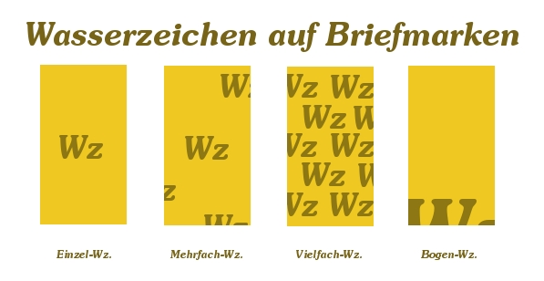 Schematische Darstellung verschiedener Wasserzeichenarten bei Briefmarken